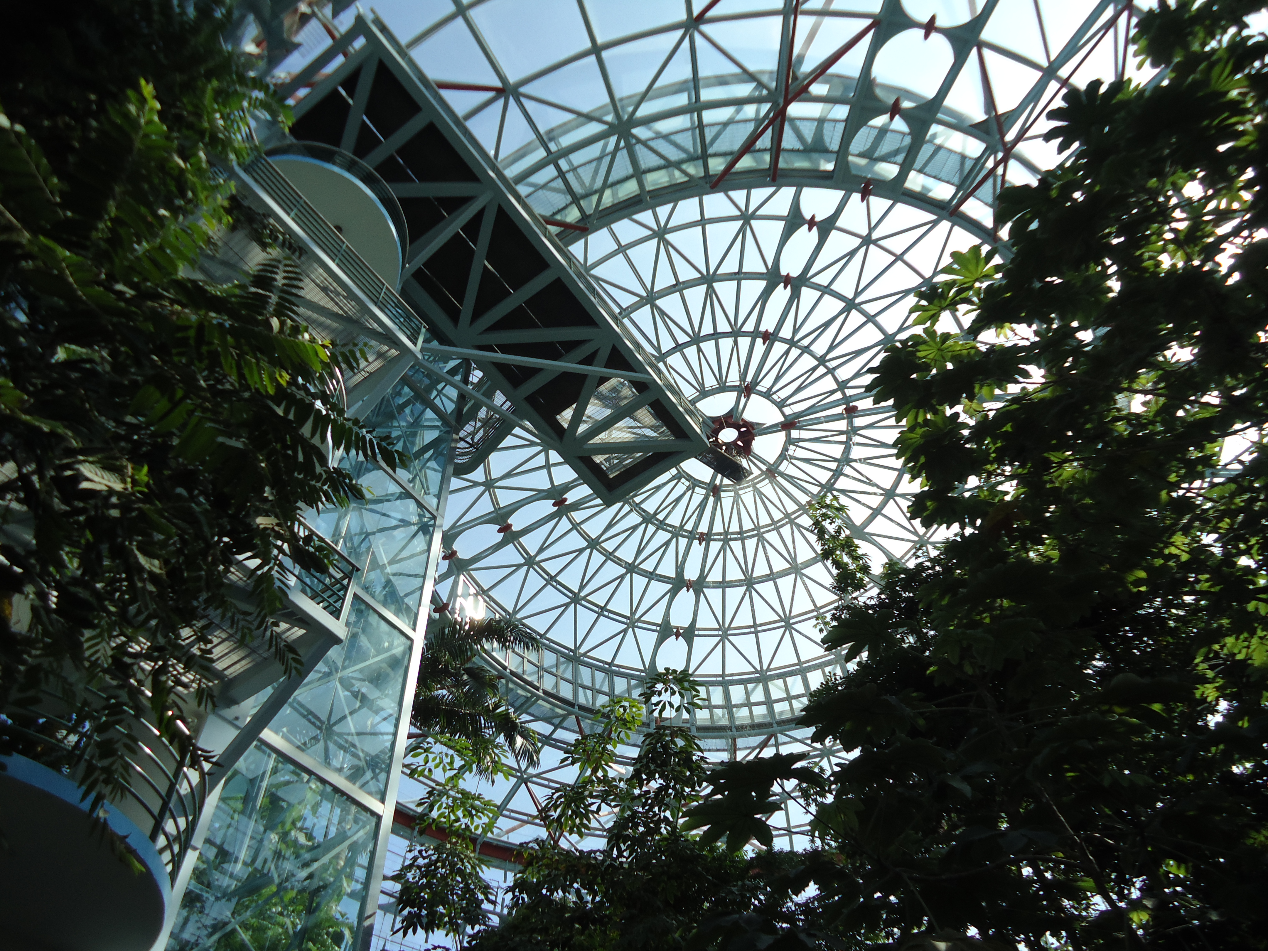 中文（台灣）: 國立自然科學博物館植物園。